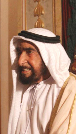 Xeque Zayed Bin Sultan Nahyan.